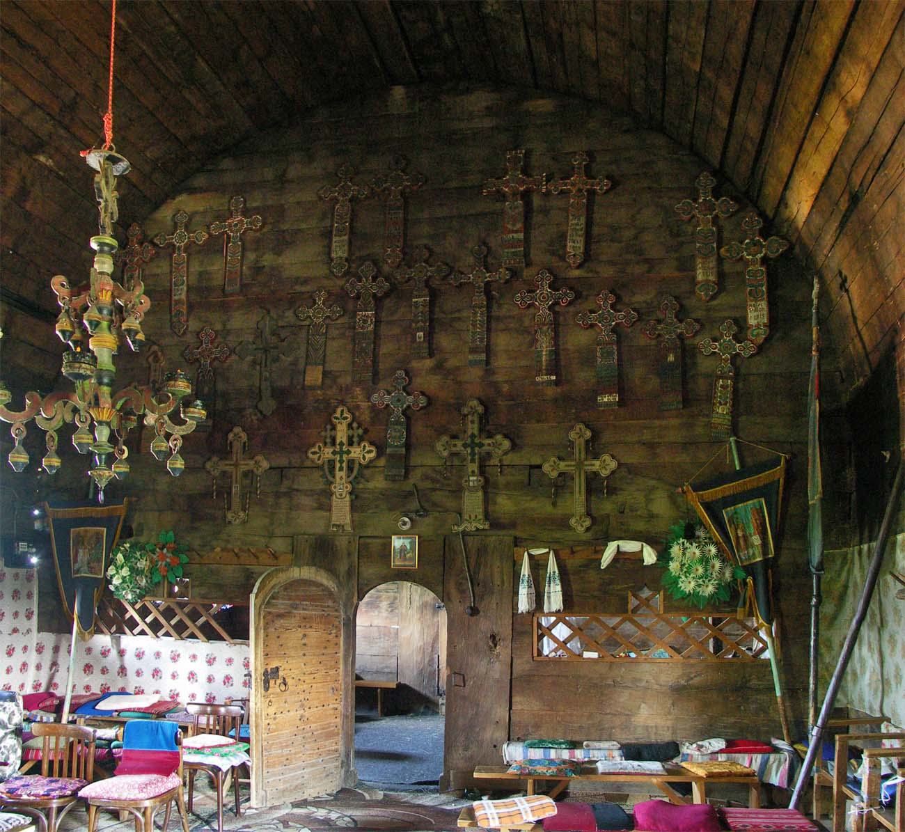 Biserica de lemn din Brădet, Bihor, navă, peretele vestic.